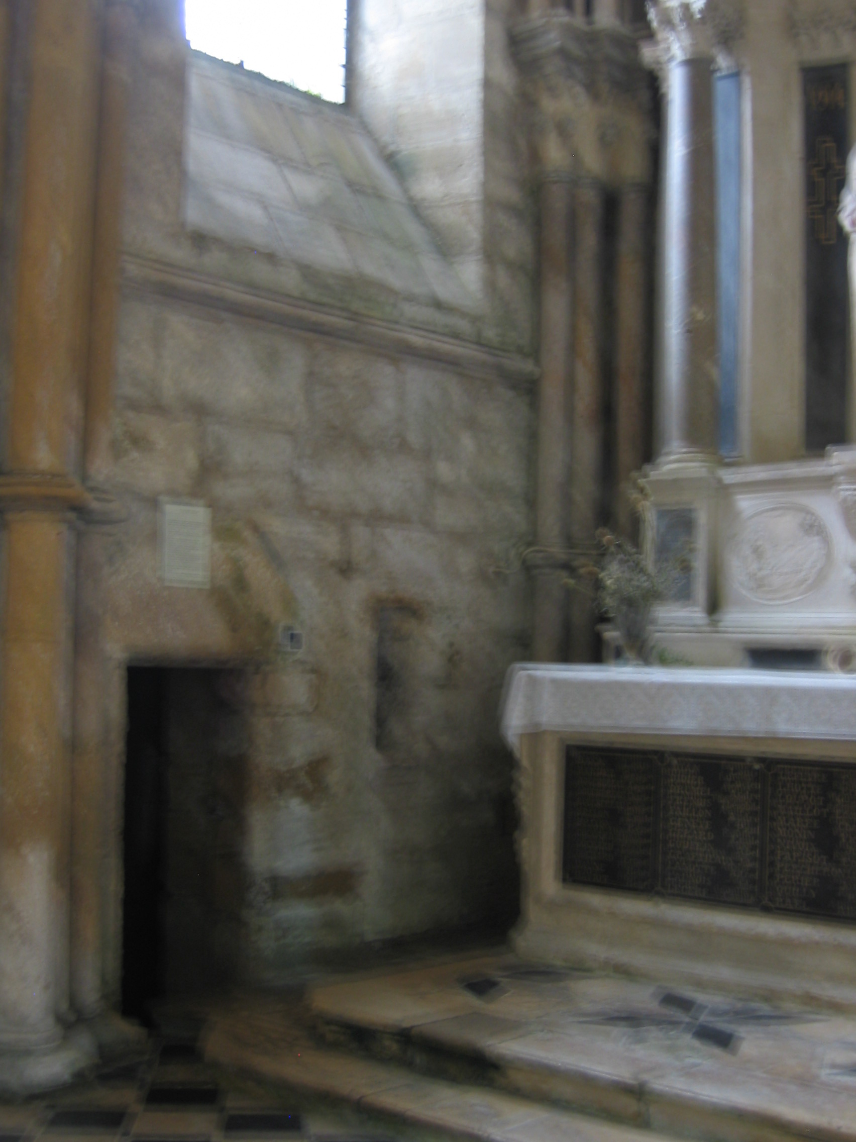 recluserie Abbatiale Mouzon Ardennes France